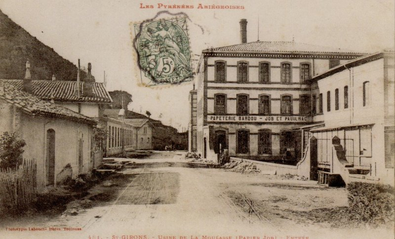 Eycheil : Carte postale de la papeterie de la Moulasse.